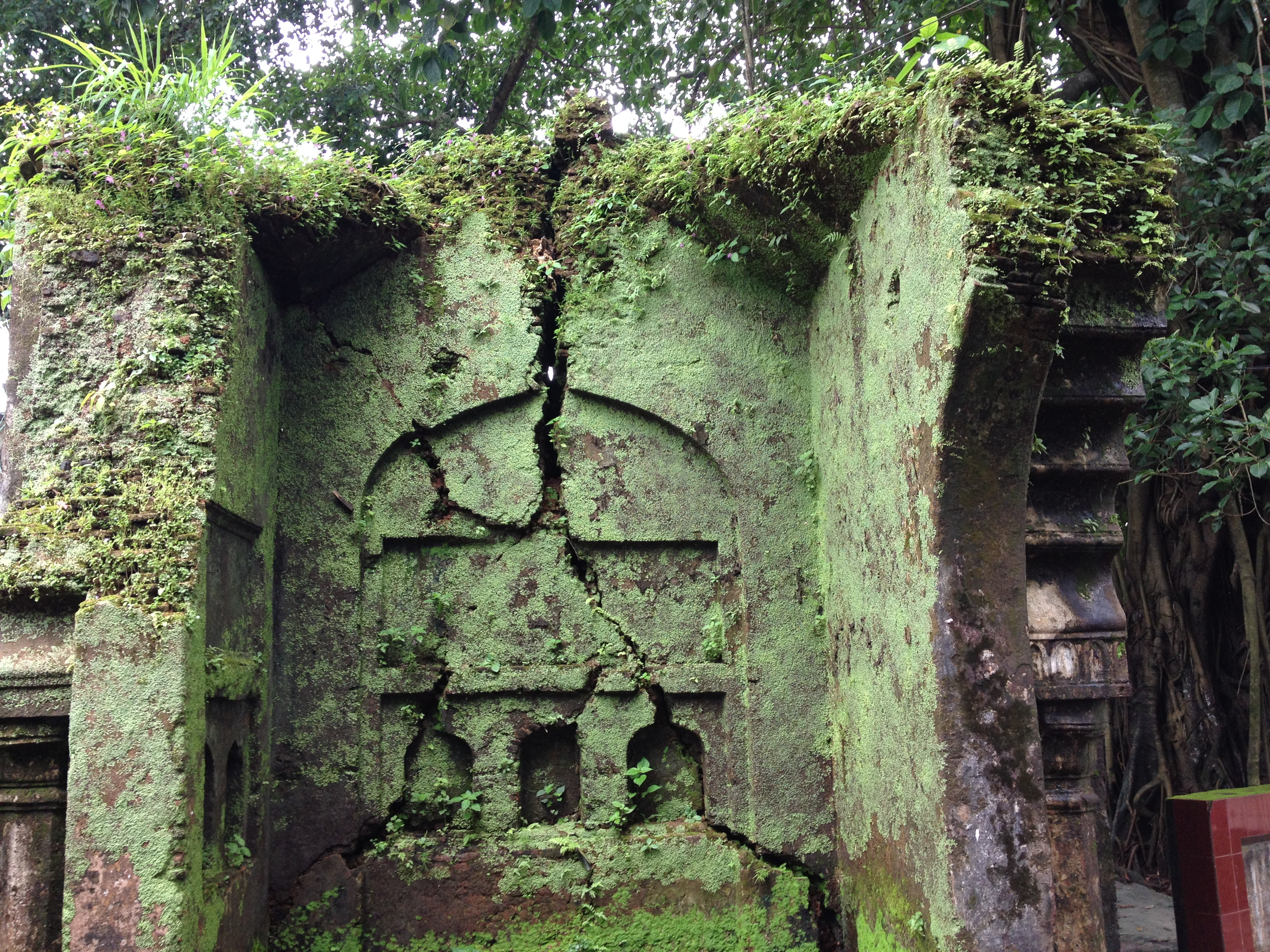 জয়েন্তশ্বরী বাড়ির প্রবেশদ্বার এর দেয়াল এর অংশ